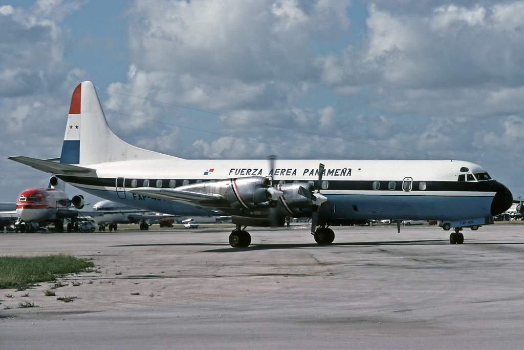 FAP-400 (cn 2022) A potrait of prop power, here is the last Electra to be built. First delivered to Garuda in 1.61 as PK-GLC and bought by Panama in 11.73. Later HP-1042, S9-NAF, TG-ANP, HK-3707X and HK-3176. Wfu, and b/u at Bogotá in 5.00